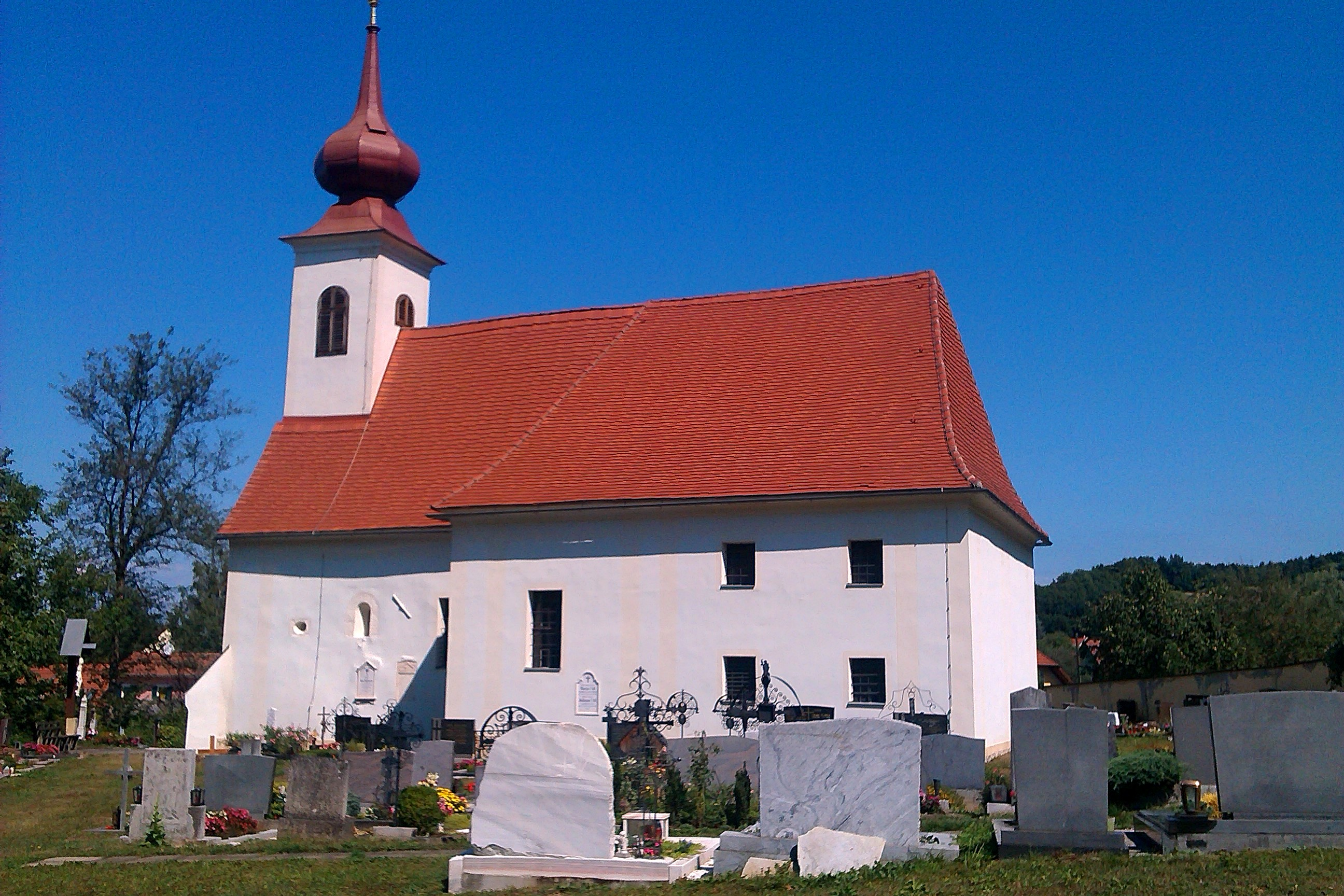 Kath. Filialkirche hl. Jakob